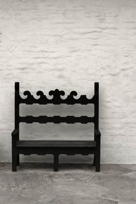 A bench.